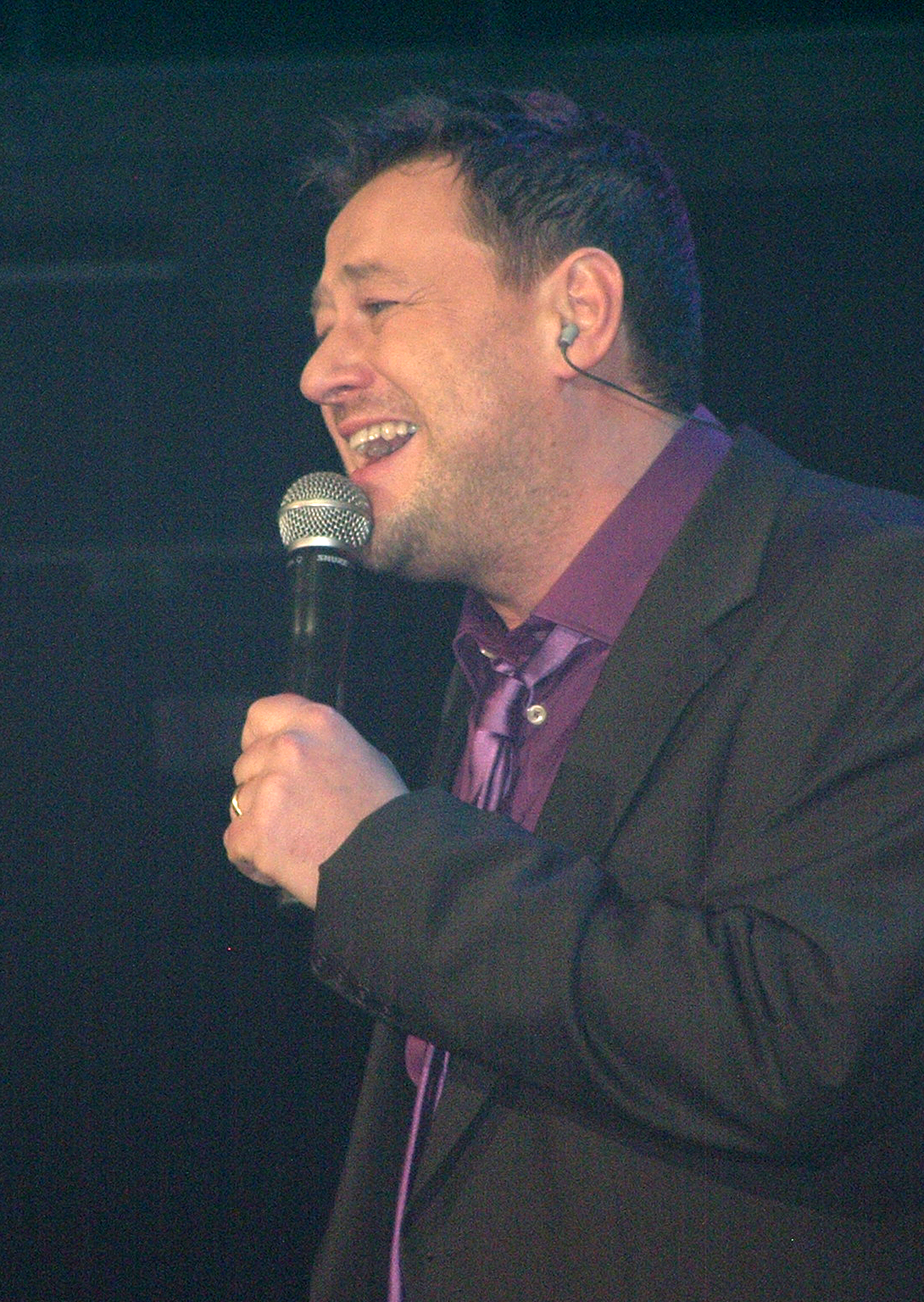 Bart De Pauw tijdens Steracteur Sterartiest Live on Stage op 1 februari 2008 in de Lotto Arena Antwerpen.